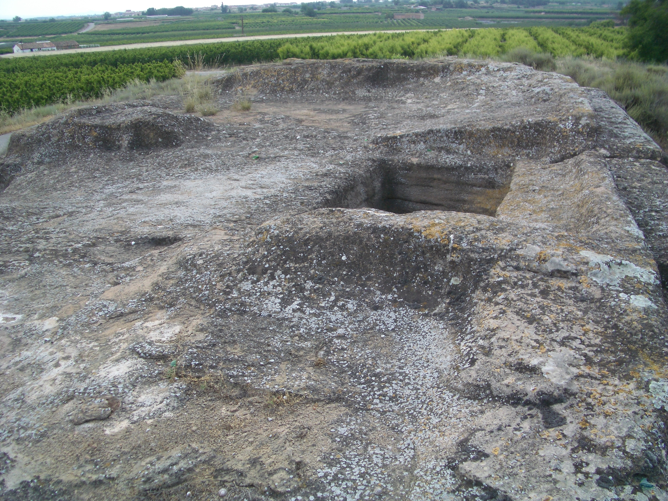 Detall superior de les restes on s'aprecia l'antiga sitja.